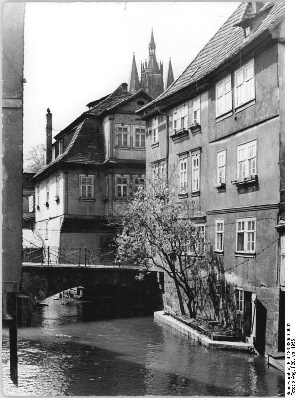 Erfurt, Altstadt Zentralbild Erfurt (Kollektiv) 28.5.1956 Schöne deutsche Heimat. UBz: Erfurt - Partie zwischen Nonnengasse und Lange Brücke.